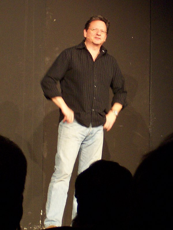 Günter Grünwald am 3.3.2006 in Ottobrunn.